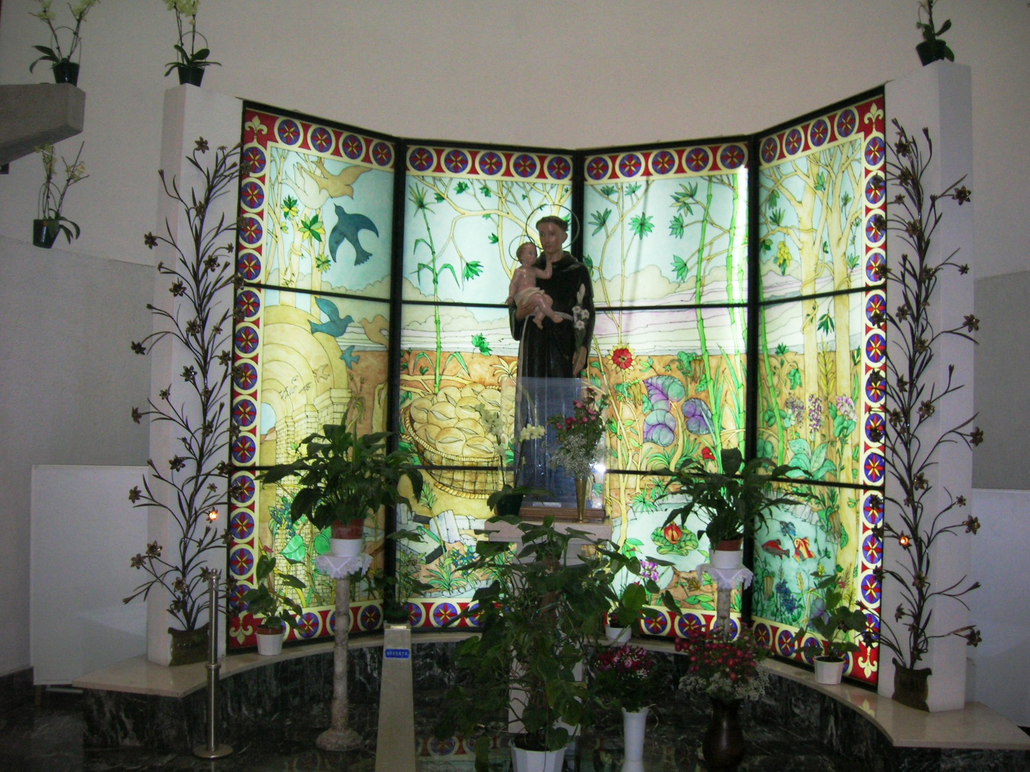 La cappella dedicata a Sant'Antonio nella chiesa di Sant'Antonio da Padova di Castellammare di Stabia